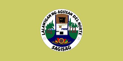 Dit materiaal is afkomstig van of en is door de auteur Jaume Ollé als GFDL beschikbaar gesteld, zie de toestemmingsemail. Hiermee vervallen de strictere voorwaarden in de disclaimers op de genoemde sites.